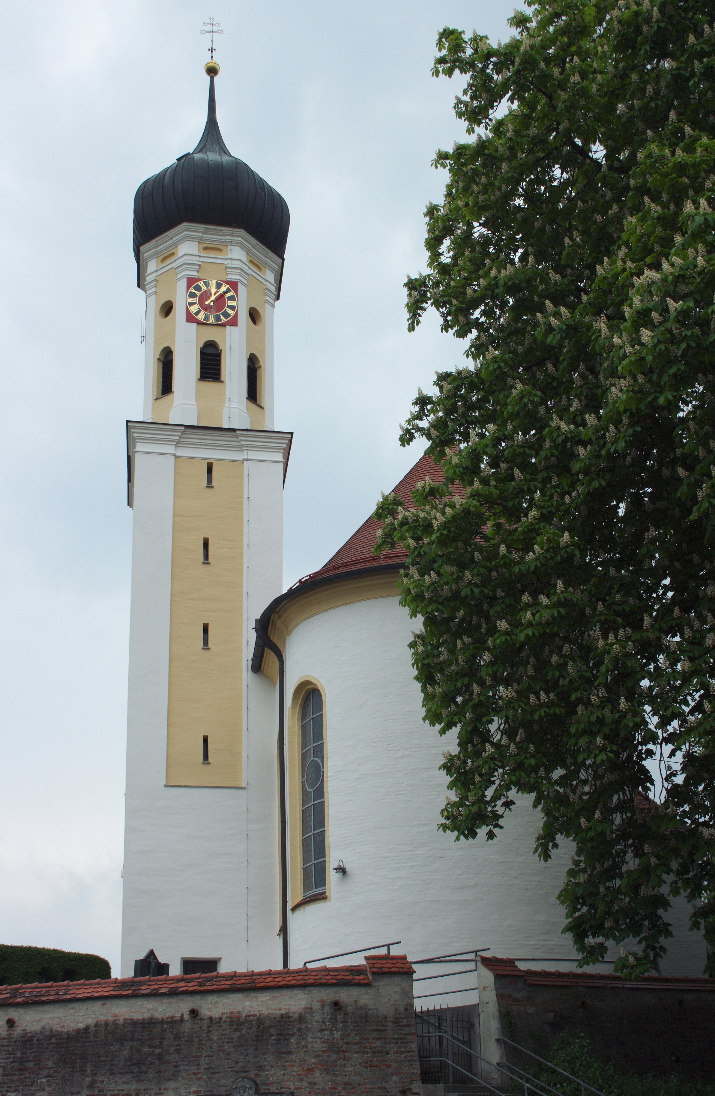 Katholische Pfarrkirche St. Nikolaus in Dürrlauingen, einer Gemeinde im Landkreis Günzburg (Bayern), von 1768, von Joseph Bichlmayer errichtet, Zwiebelturm